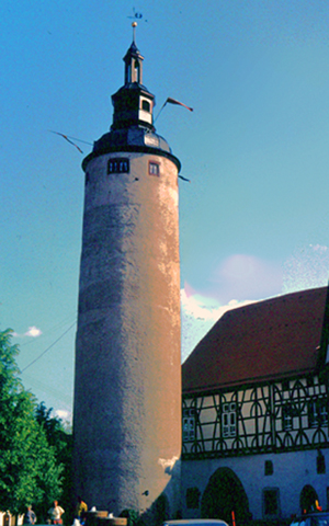 Der Türmersturm, Wahrzeichen von Tauberbischofsheim